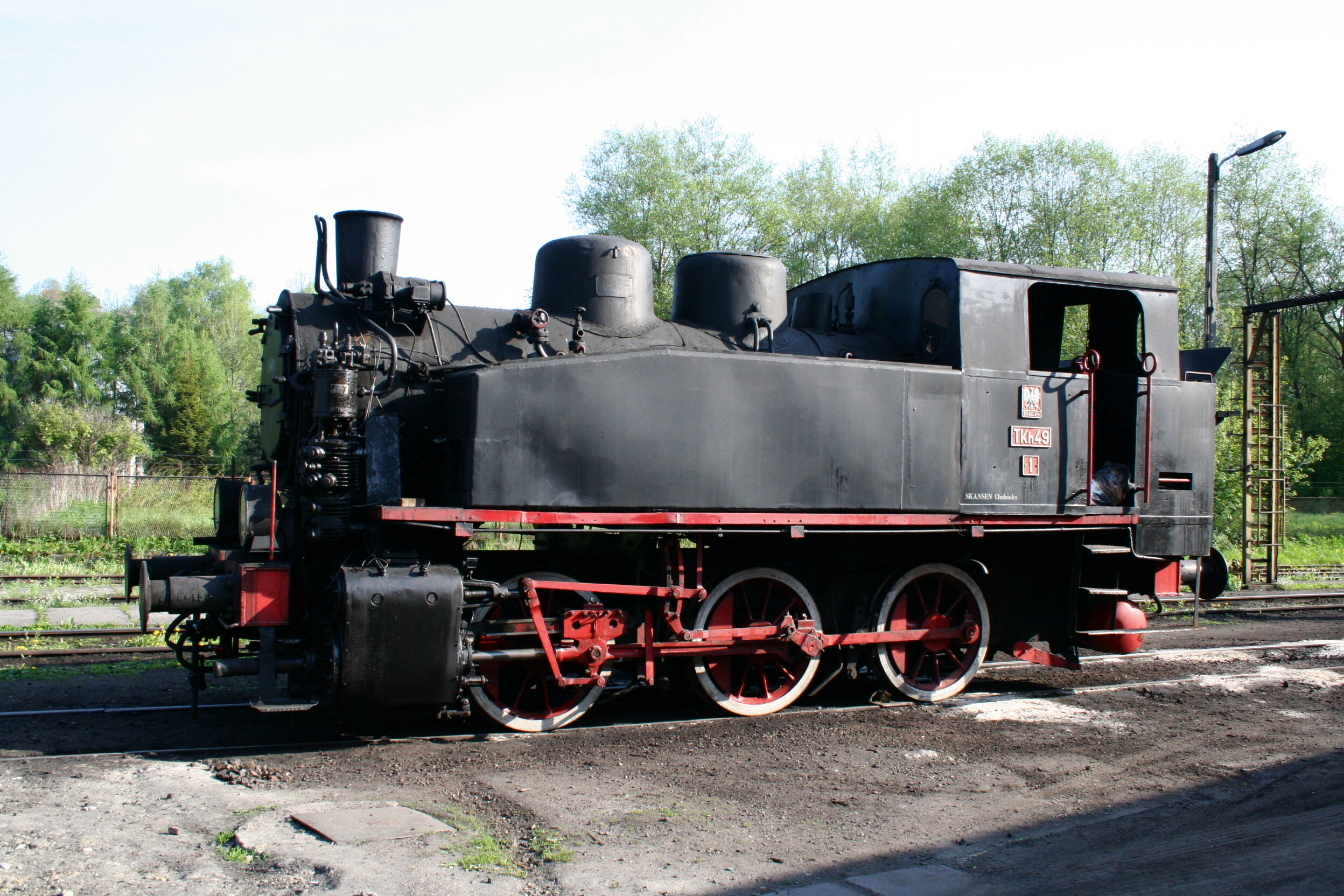 TKh49